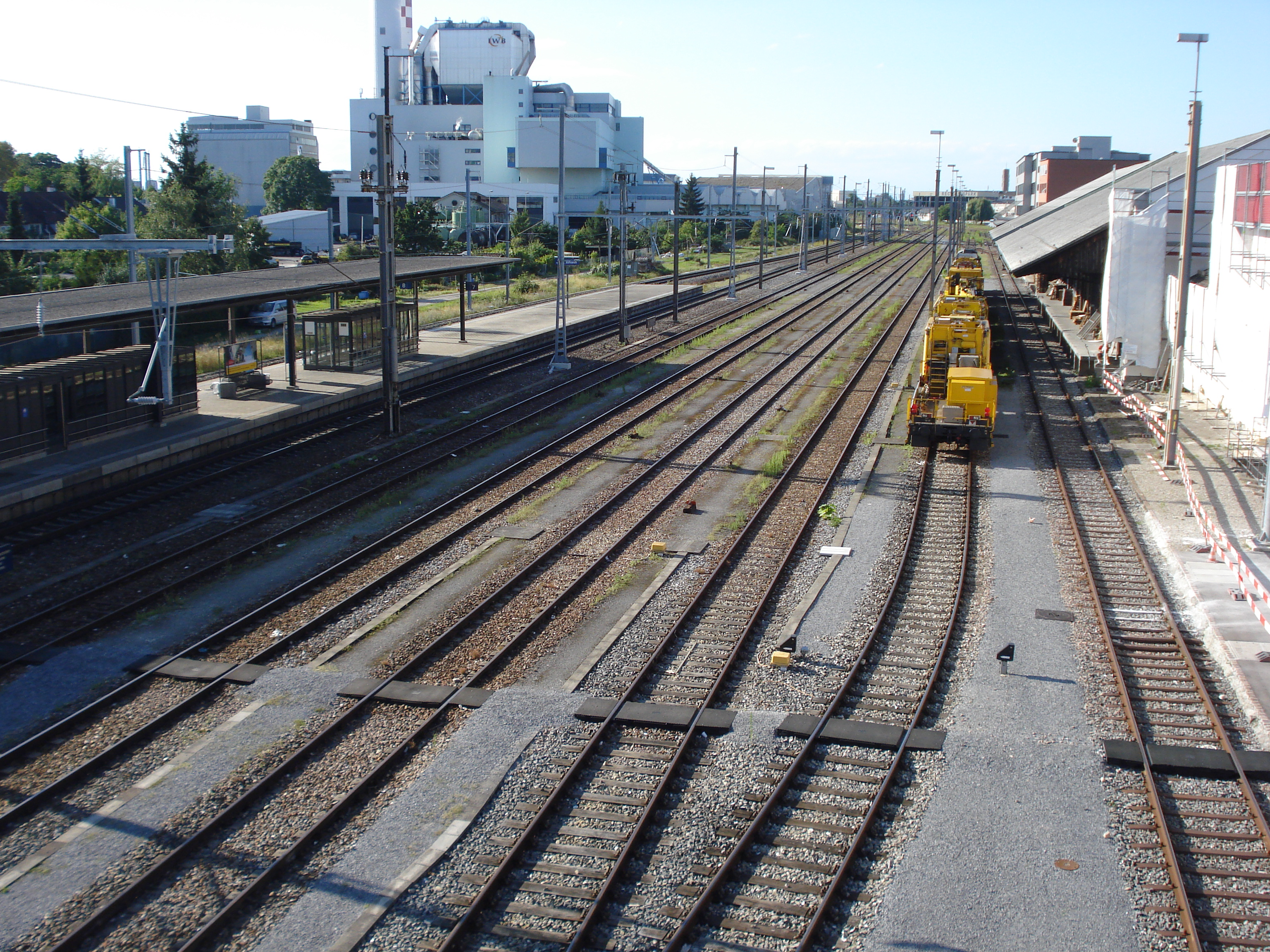 La gare de Bâle-Saint-Jean.